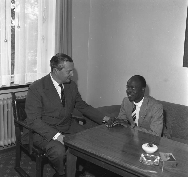 Der Botschafter von Etzdorf empfängt den Leiter des Informationsamtes und des Rundfunks von Guinea, Mr. Abdoulaye E. Touré, im Auswärtigen Amt